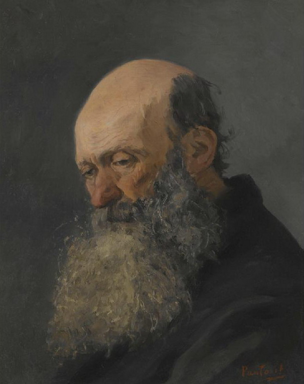 Périclès Pantazis (1849-1884): Old Oikonomou